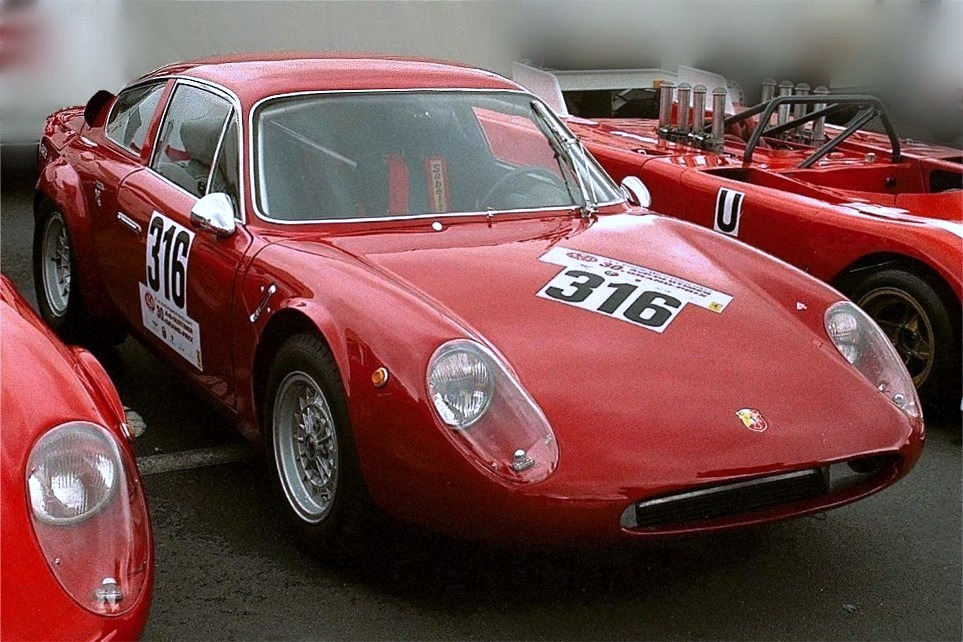 Abarth-Simca 1300 beim AvD-Oldtimer-Grand-Prix im Fahrerlager des Nürburgrings